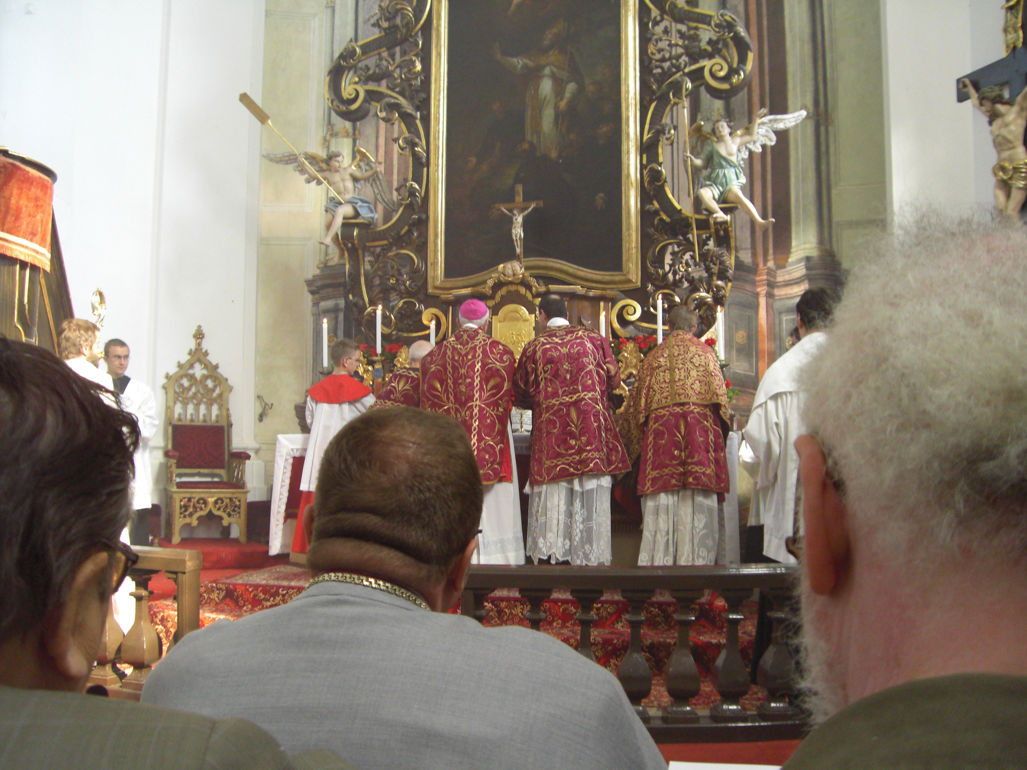 Pontifikální Mše podle misálu Jana XXIII. v Počapech u Terezína